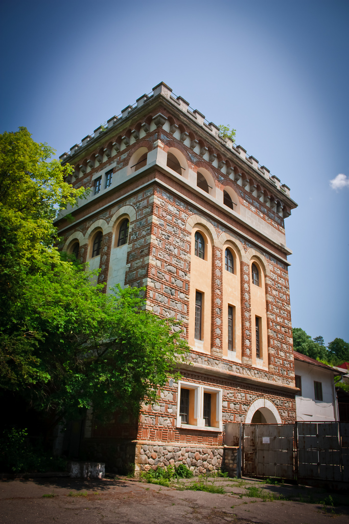 Observator astronomic domeniul Bratianu Stefanesti 03